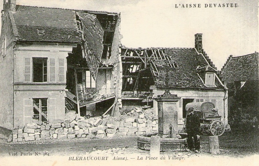 Blérancourt dévasté par la guerre de 1914-1918, carte postale ancienne non grevée de droits.